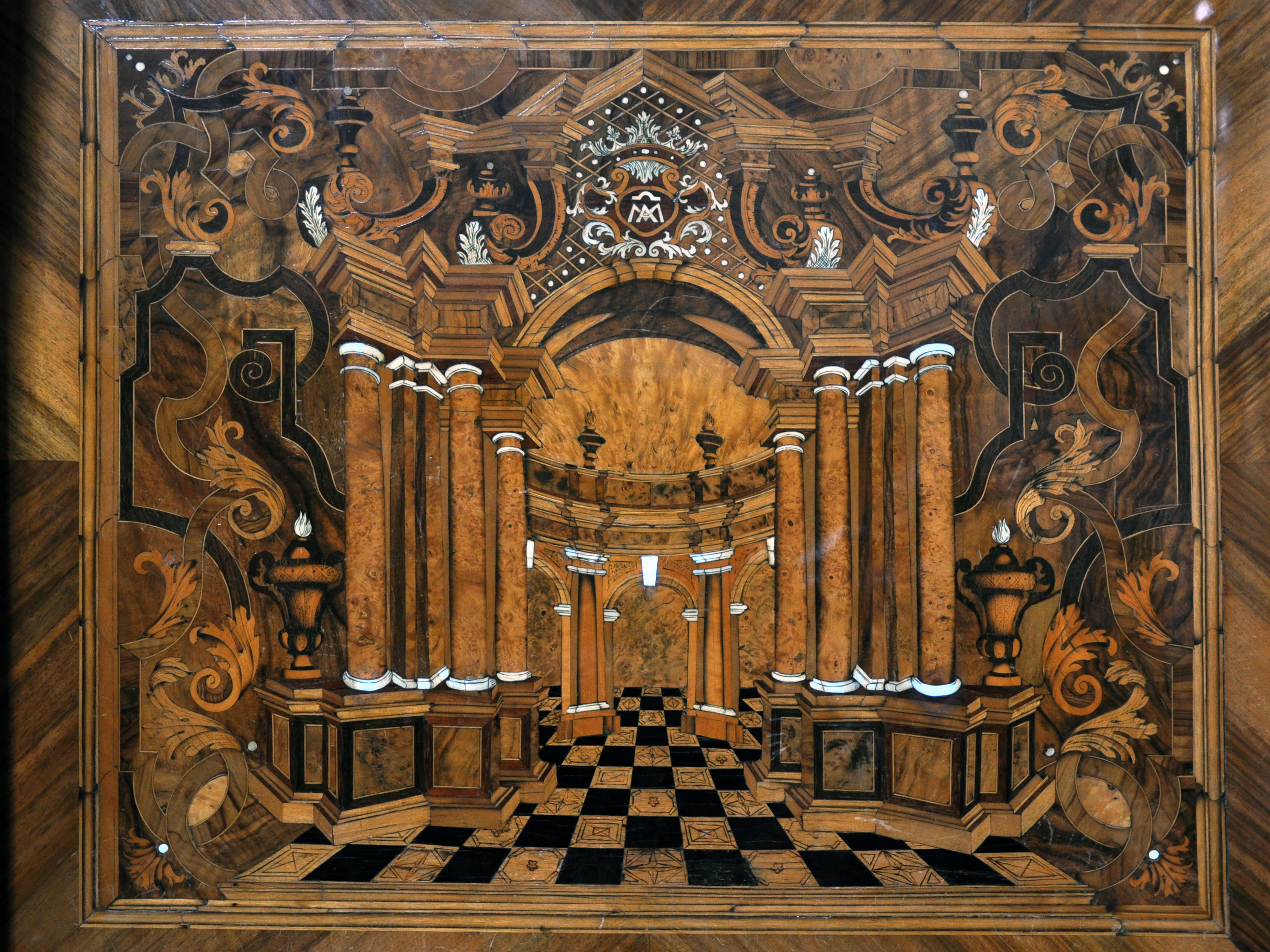 Cathédrale Saint-Pierre de Trèves. Détail: panneau de marquetterie par J-J Schacht de Hambourg et son atelier, élément de stalles provenant de la Chartreuse Saint-Michel de Mayence et déplacées dans le choeur Ouest de la cathédrale de Trèves en 1781.